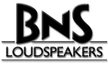 De officiële BNS logo.